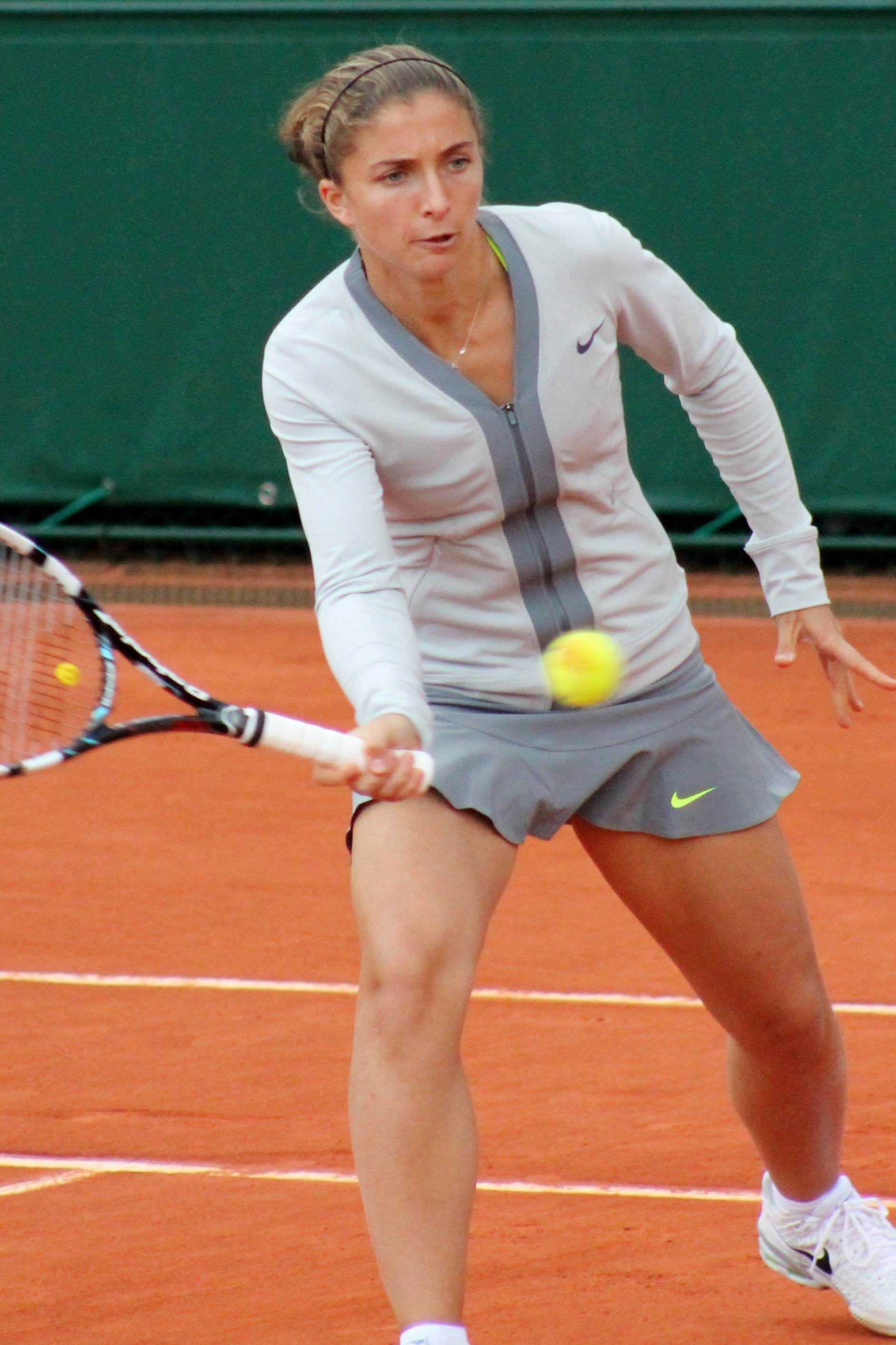 Errani RG13 (7)